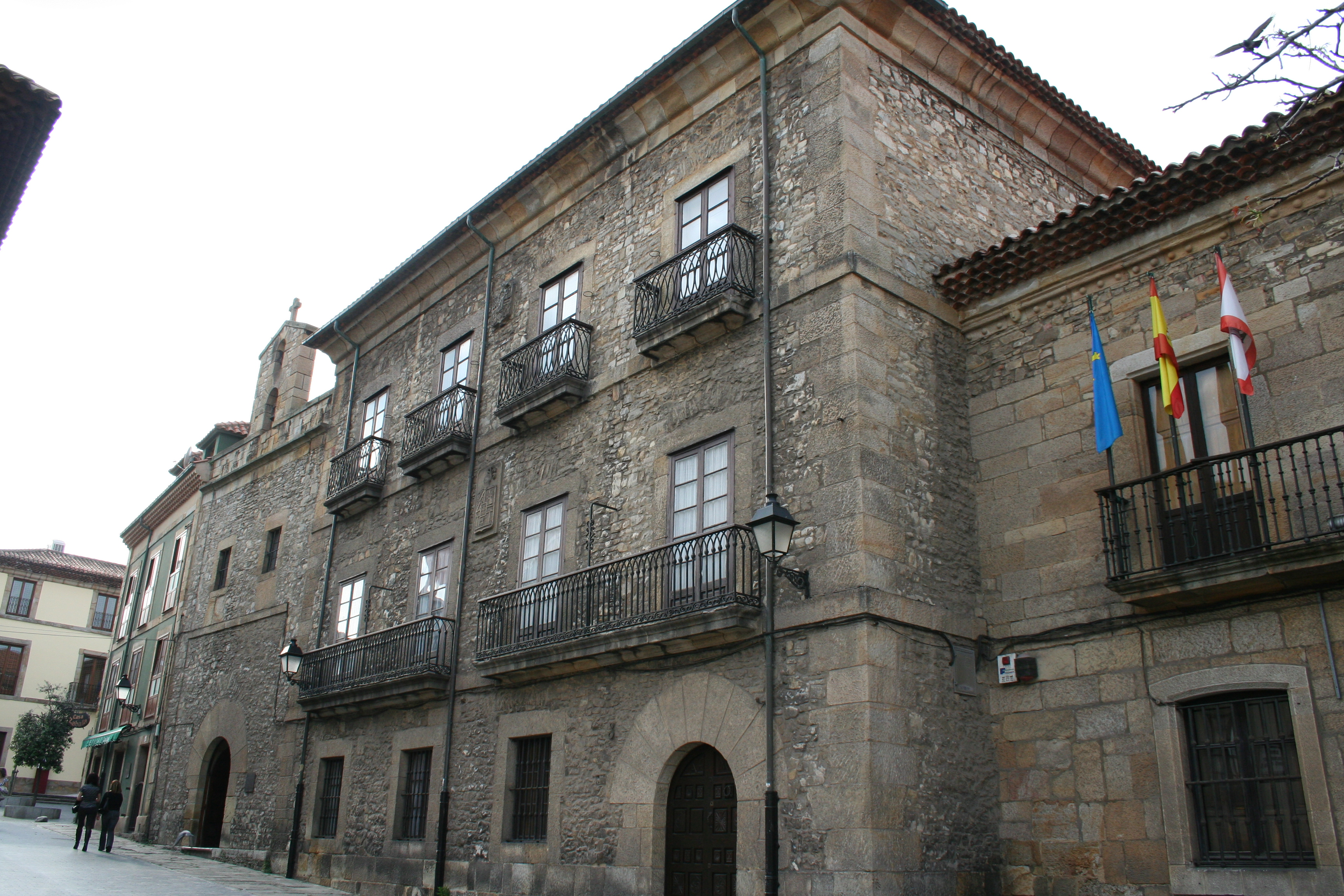 Barrio de CimadevillaGijón